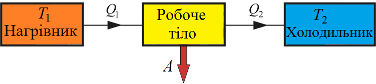 Структурна схема теплового двигуна